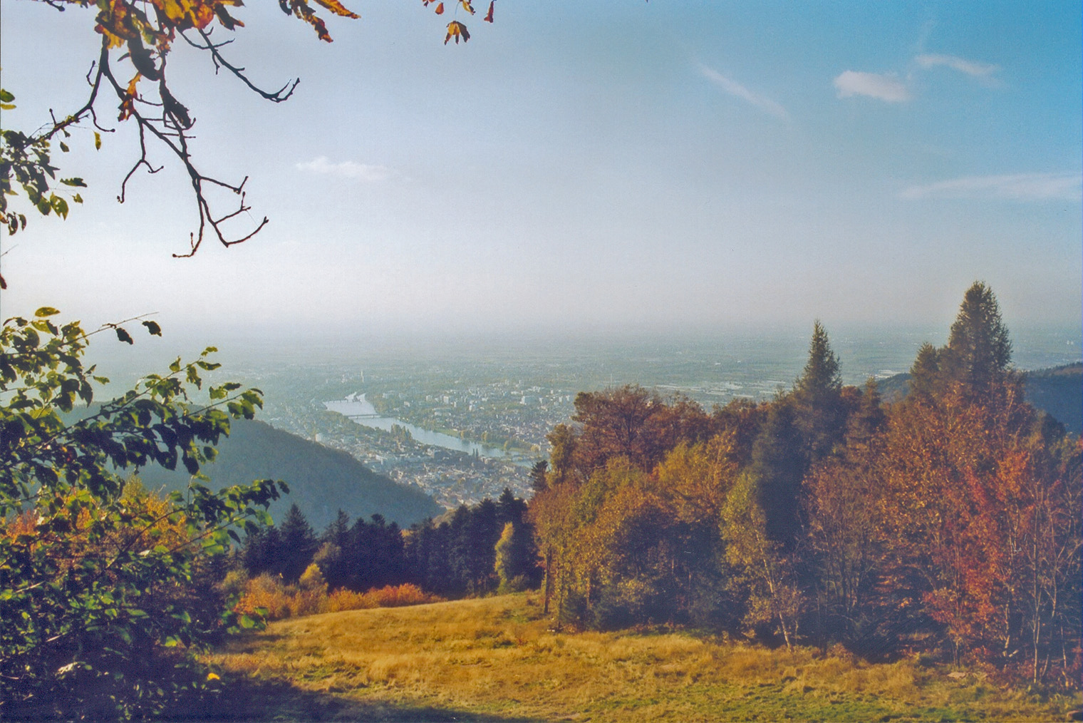 Goldener Oktober in Heidelberg